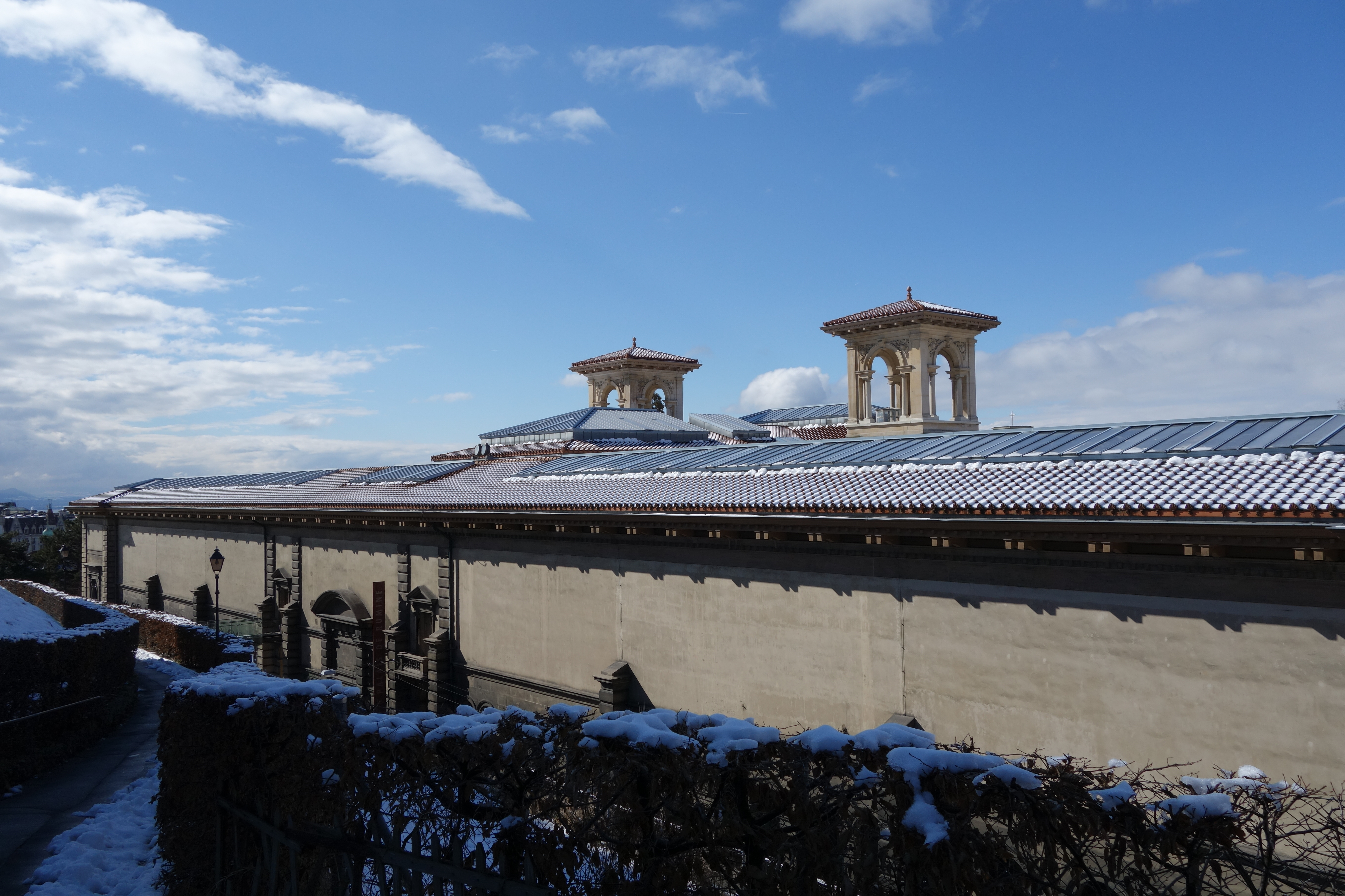 Le palais de Rumine à Lausanne, vu depuis la cité, c'est-à-dire de dos.